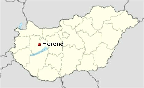 Η τοποθεσία του Herend στην Ουγγαρία